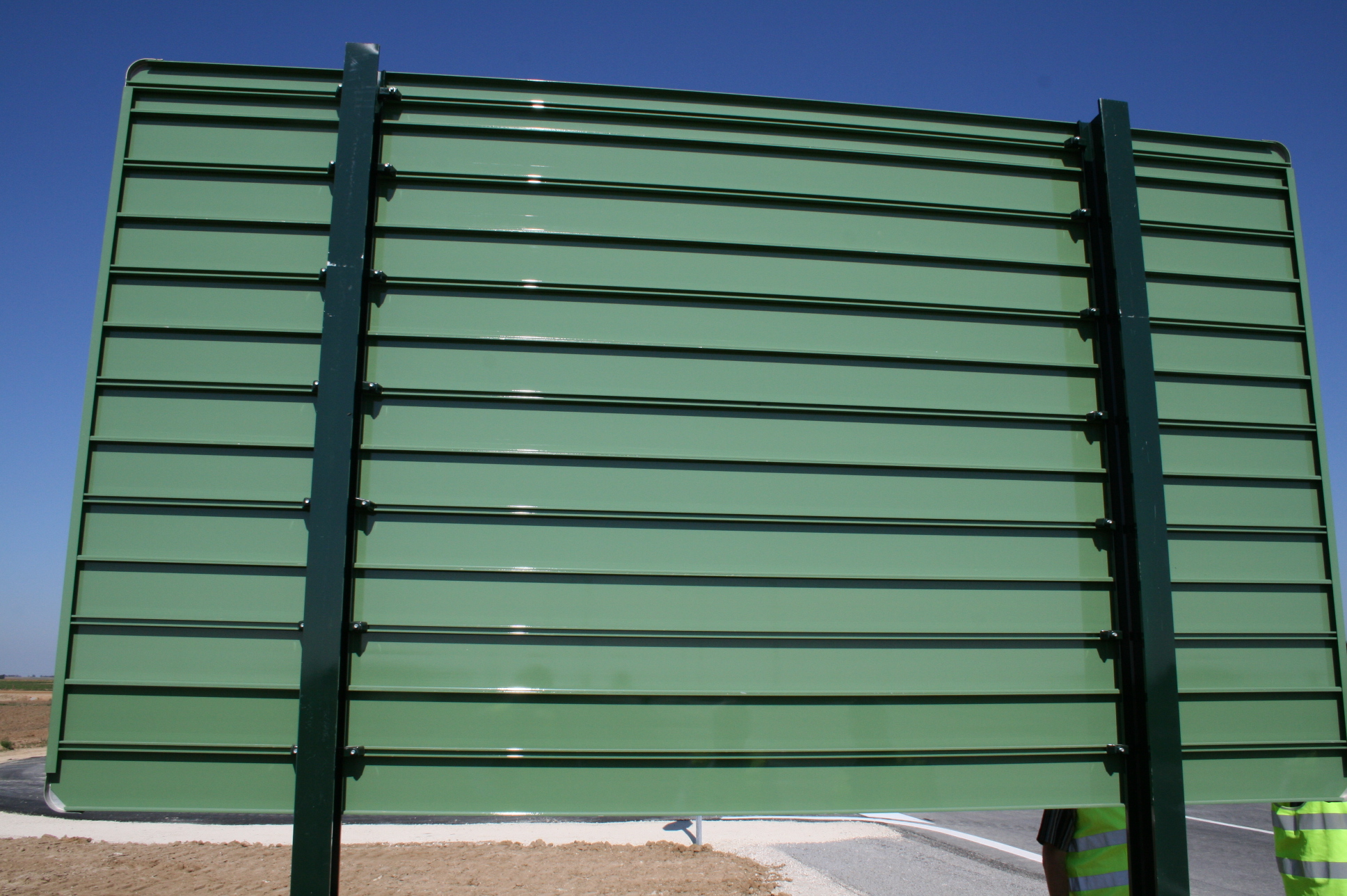 Panneau de signalisation de catégorie SD3 (France)